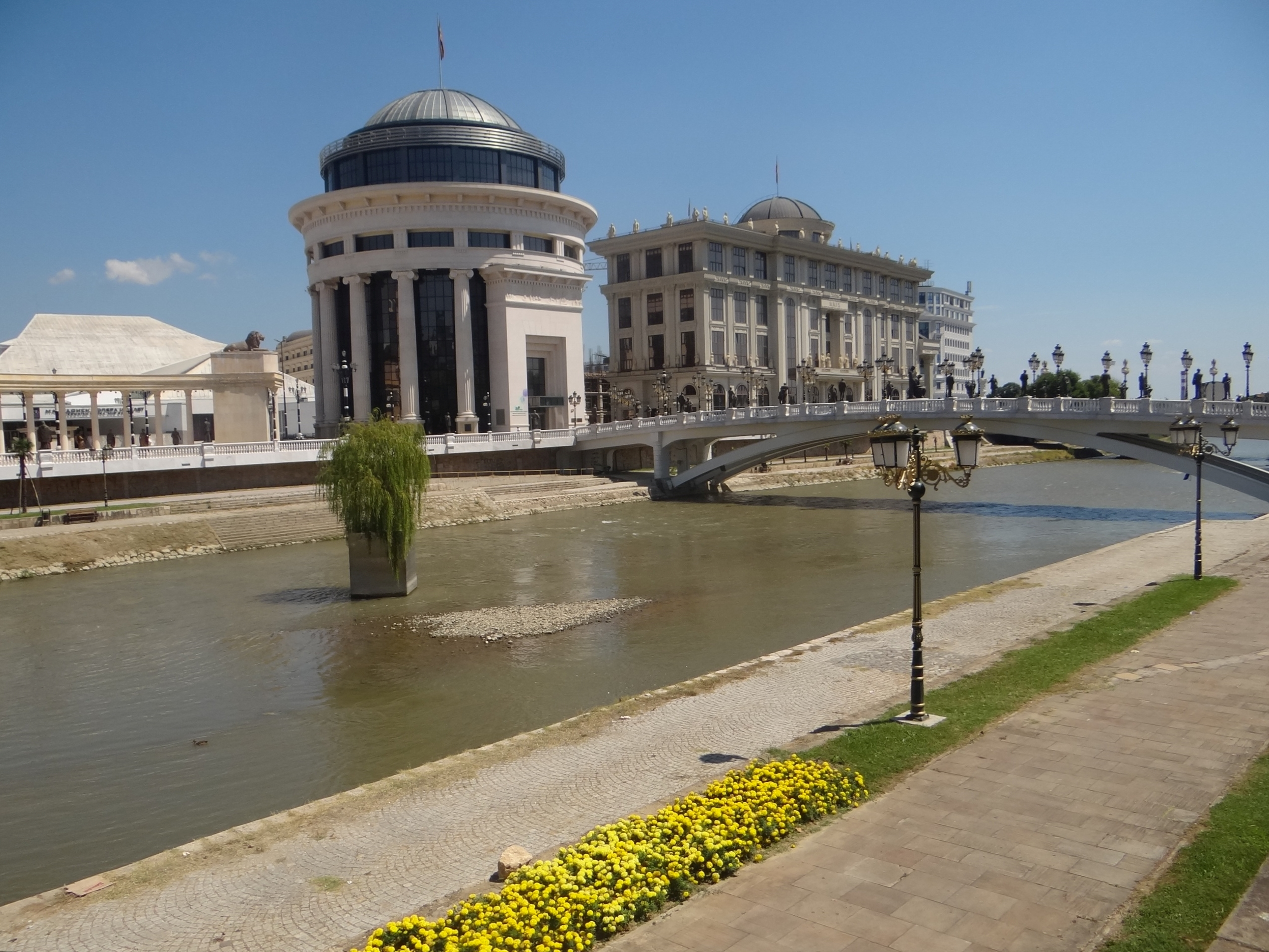 Vardar in Skopje